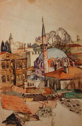 RYLSKY (dit aussi Ahü, 1901-1970), Turquie vers 1921-1922, dessin aquarellé